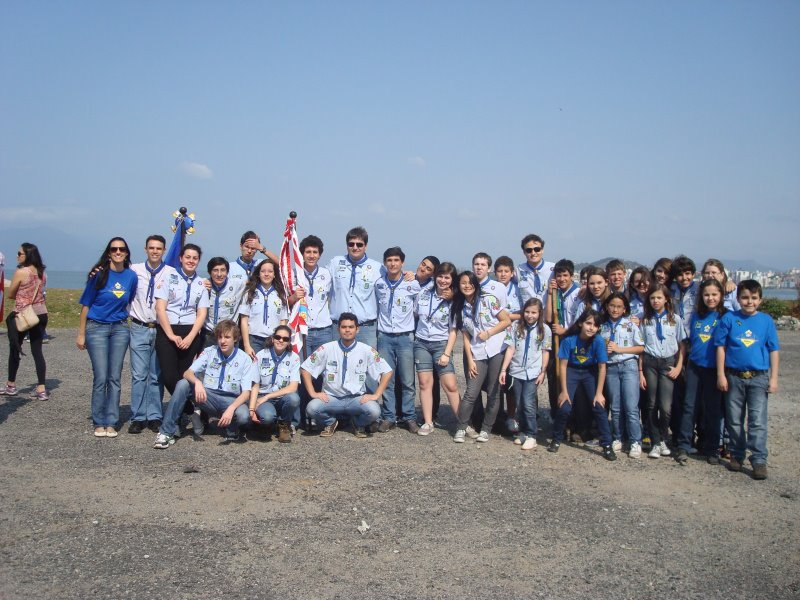 Grupo Escoteiro do Ar Hercílio Luz após o Desfile da Independência, no dia 7 de setembro de 2012